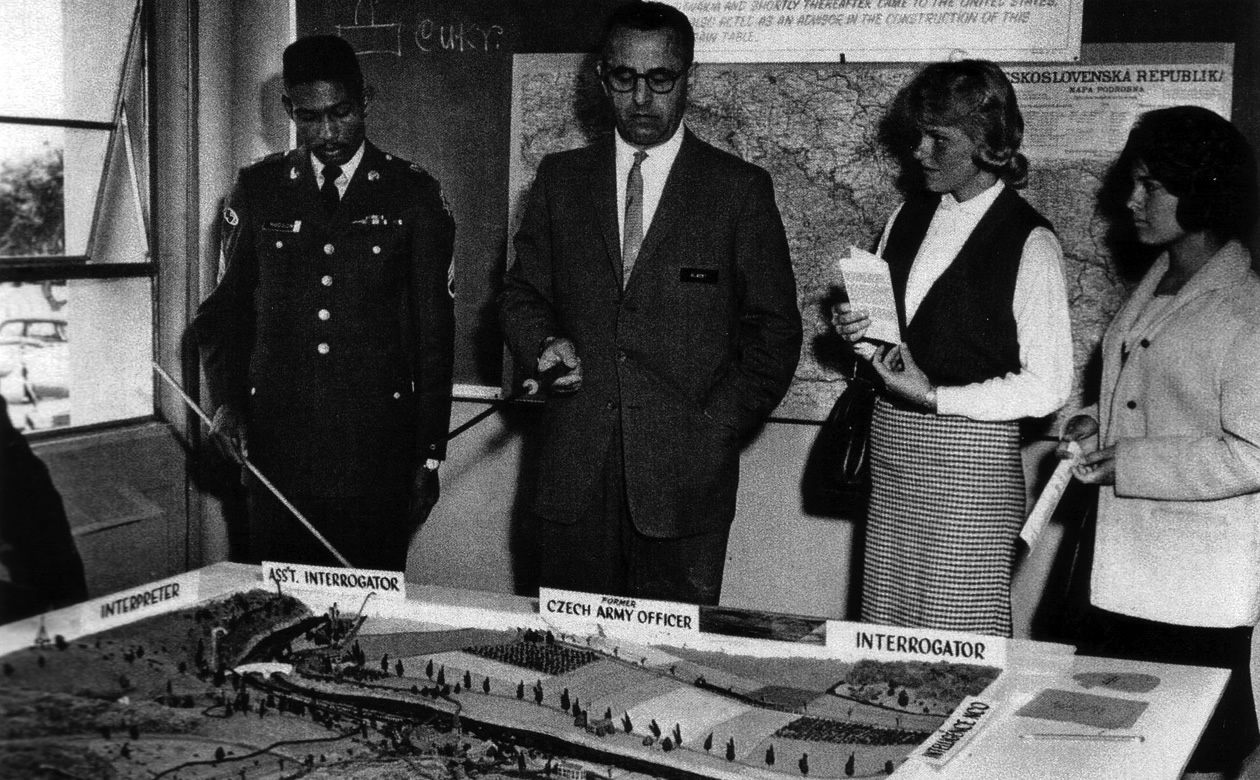 Kalifornie, Monterey, 60. léta minulého století Karel Hlásný (1911-1982), instruktor, Vojenská jazyková akademie Pentagonu (Defense Language Institute).